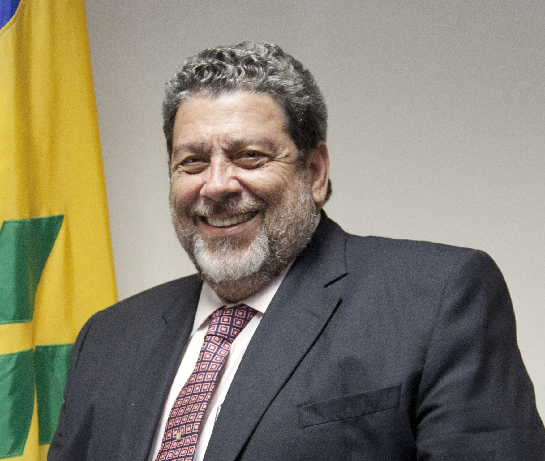 Kingstown (San Vicente y las Granadinas), 18 de marzo de 2013. El Canciller Ricardo Patiño se reunió con el Primer Ministro de San Vicente y las Granadinas, Ralph Gonsalves.